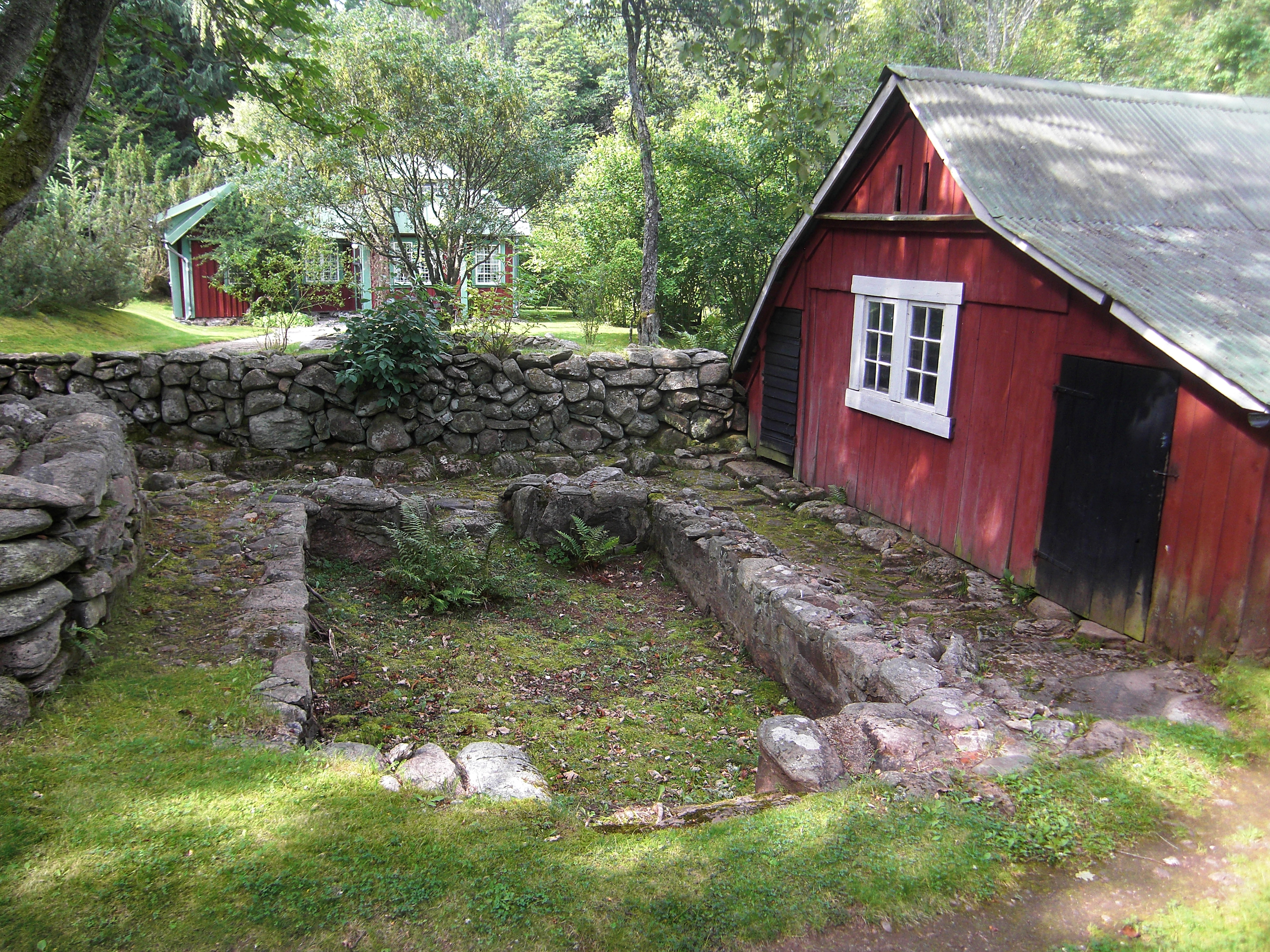 Lövkompost på Alphems arboretum. Alphems arboretum ligger i Floby socken i Vilske härad, Falköpings kommun, f.d. Skaraborgs län, Västergötland, Västra Götaland, Sverige.